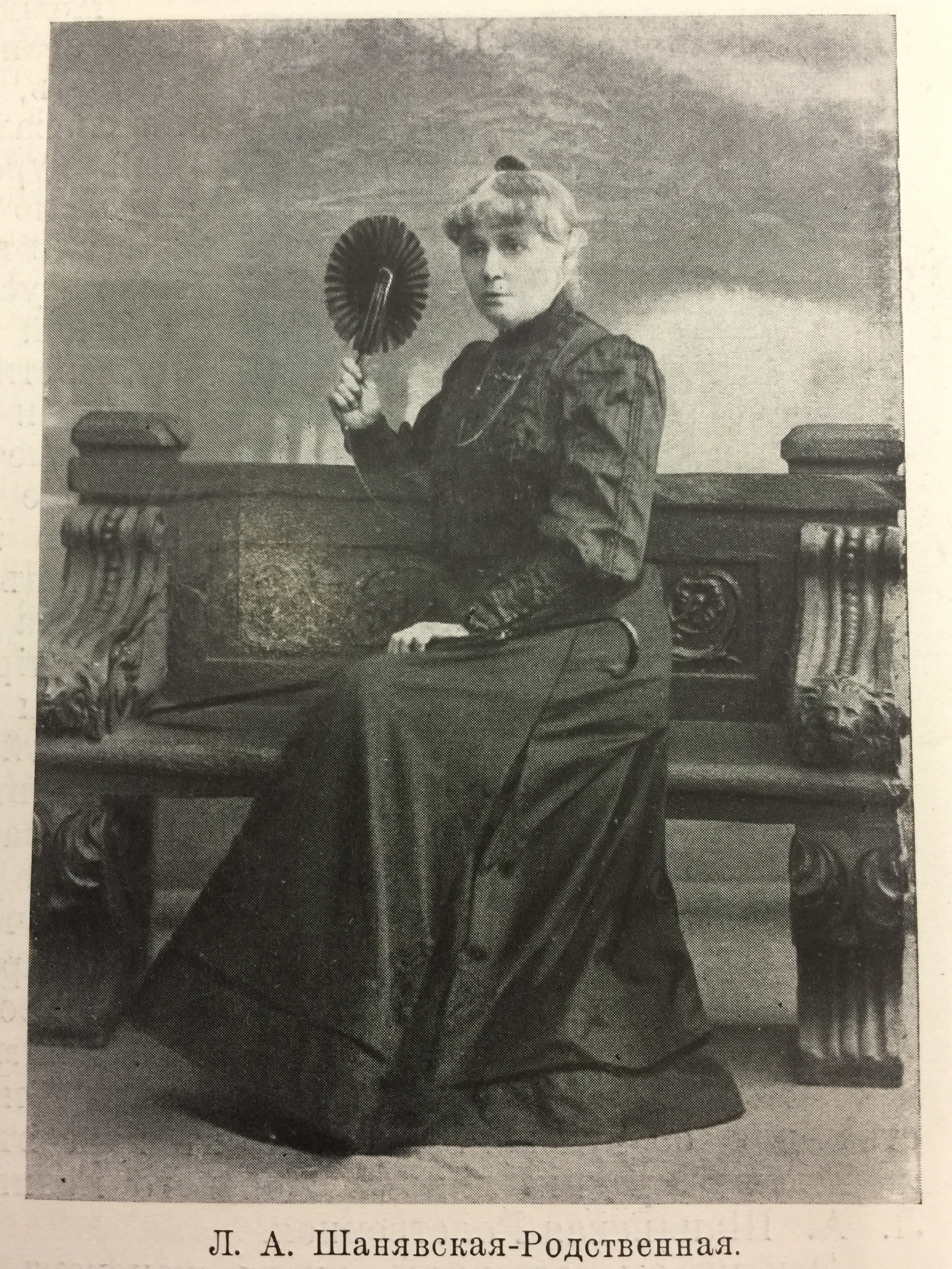 "Мужчина и женщина", энциклопедия в трех томах, том 1, 1911 г.